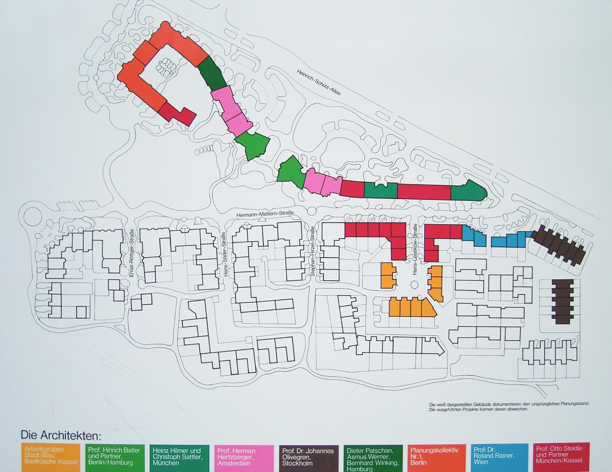 documenta urbana Lageplan der Wohnbebauung 1979-1982